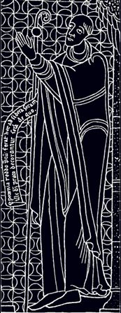 Abbildung Goswins von Anchin aus einem mittelalterlichen Manuskript. Aus: E. A. Escallier: L’abbaye d’Anchin, Lille 1852, S. 71.